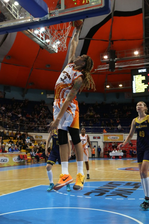 Гринер, Бриттни